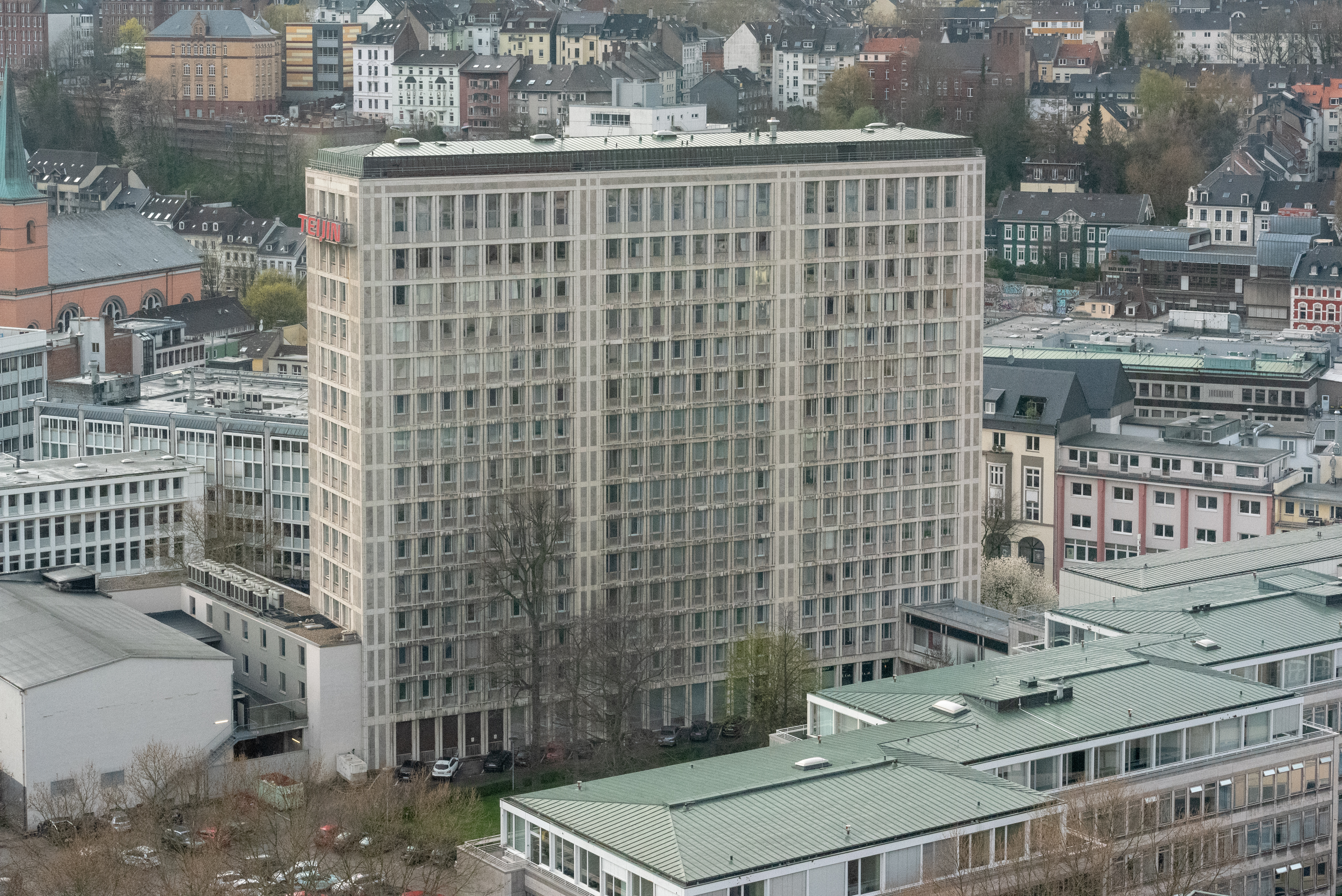 Blick vom Sparkassenturm, Wuppertal